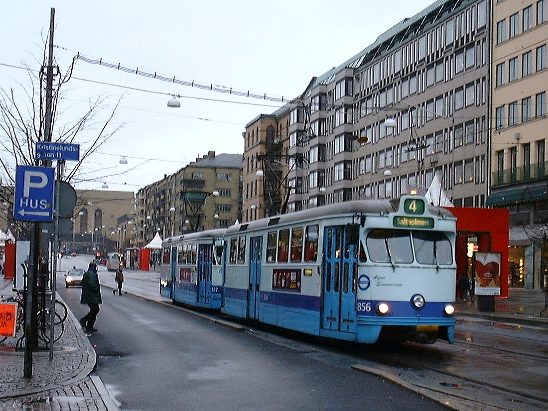 Spårvagn 856 på Kungsportsavenyen i Göteborg 1999.